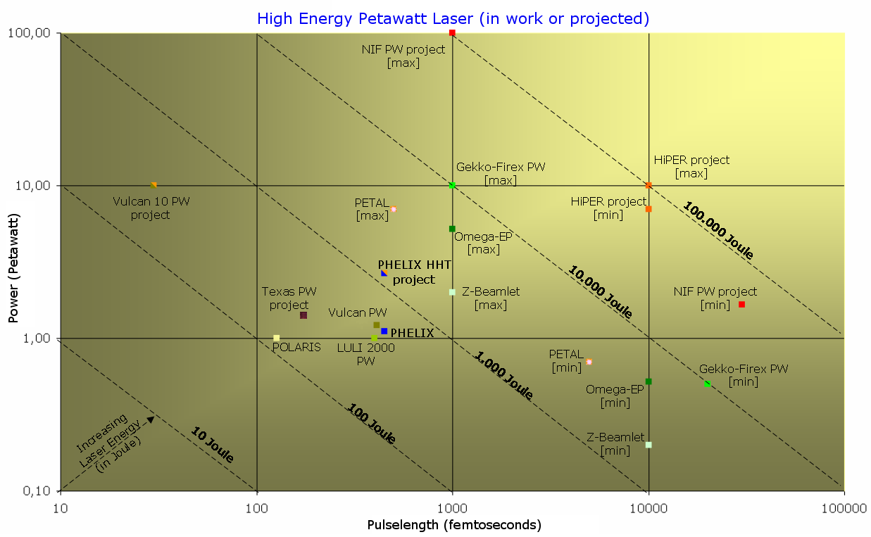 Grafische Darstellung der Hochenergie-Petawatt Laser weltweit